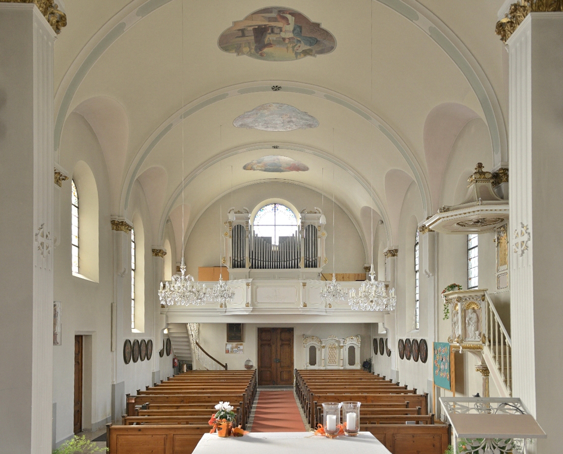 Kath. Pfarrkirche hl. Josef am Oberberg 1 in Dafins-Zwischenwasser.